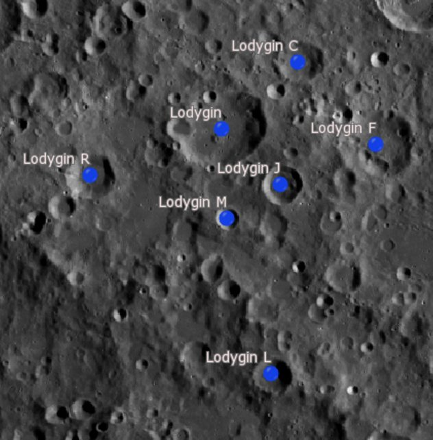 Cráter lunar Lodygin. Cráteres satélite. (Imagen LRO)